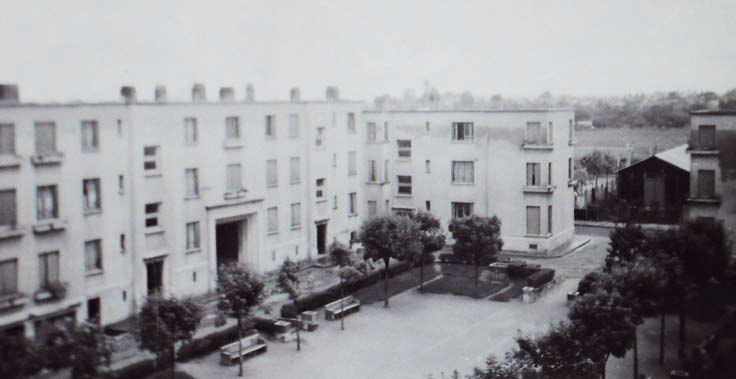 Photo aérienne de la cité-jardins du Moulon